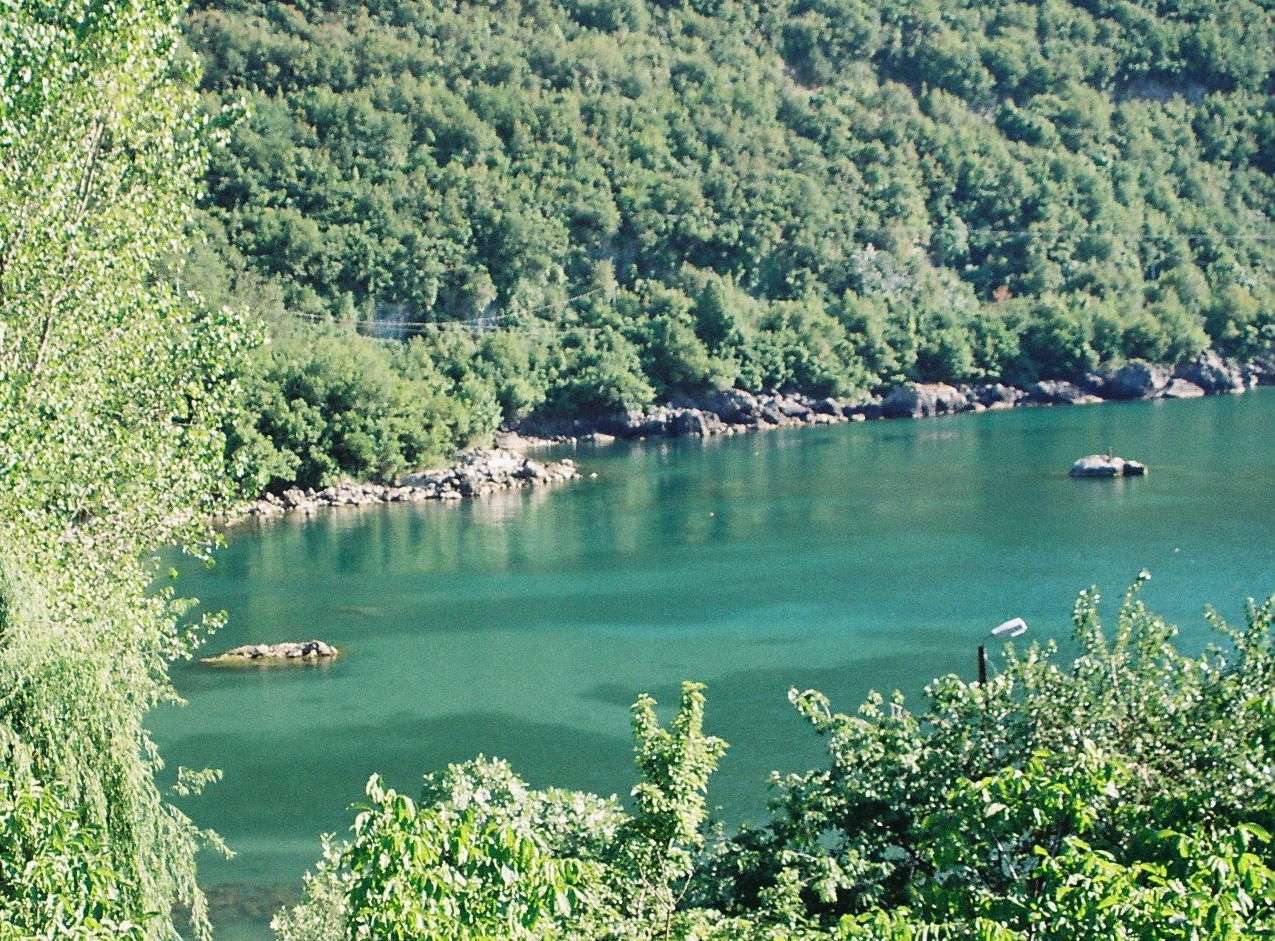 Gideros Bay,Cide,Kastamonu,Turkey